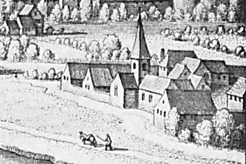 Kloster St. Peter in Kreuznach; Ausschnitt aus dem Stadtplan von 1645